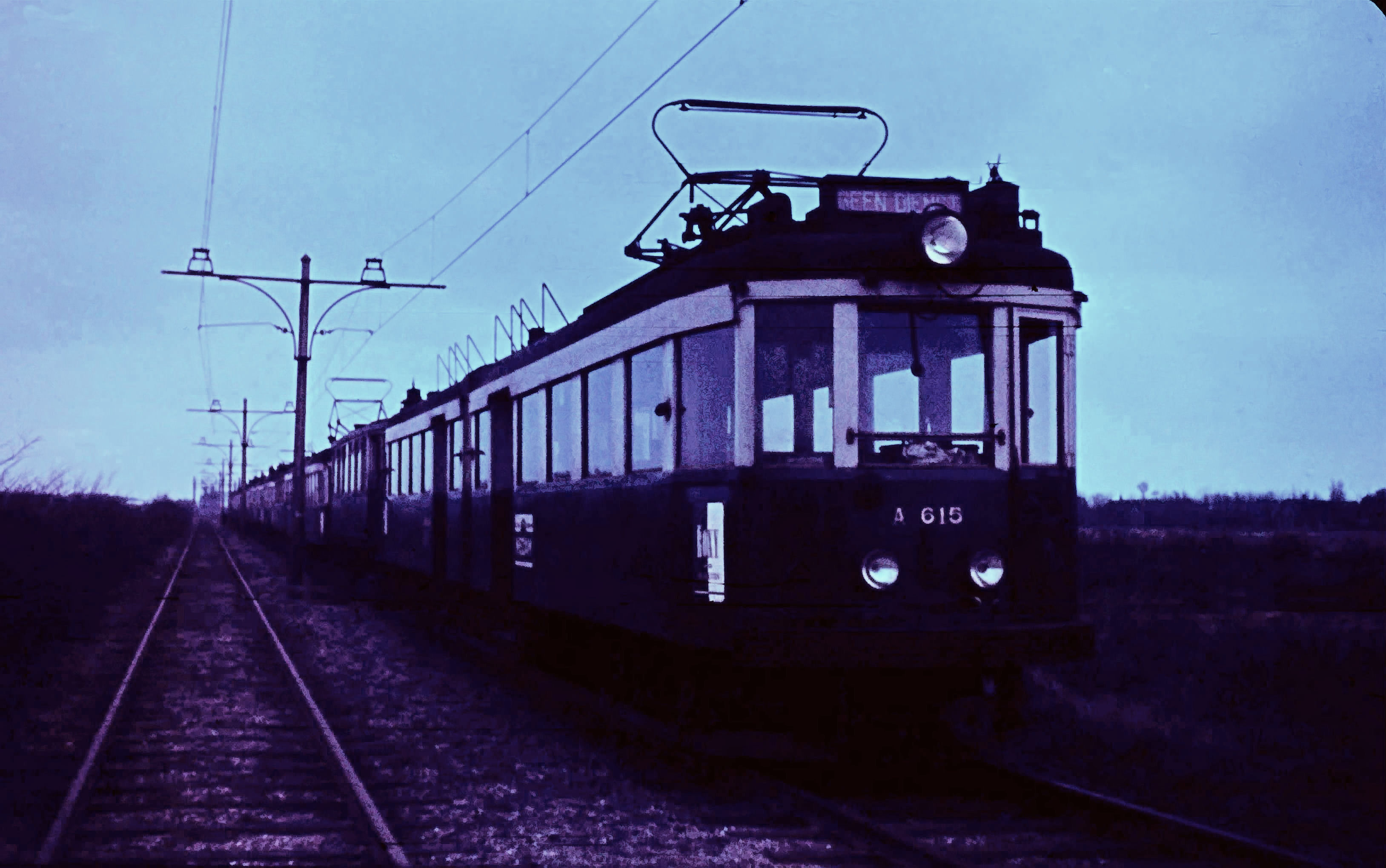 Leiden, blauwe tram, 1961; na opheffing van de laatste NZH-tramlijn buiten dienst in afwachting van sloop